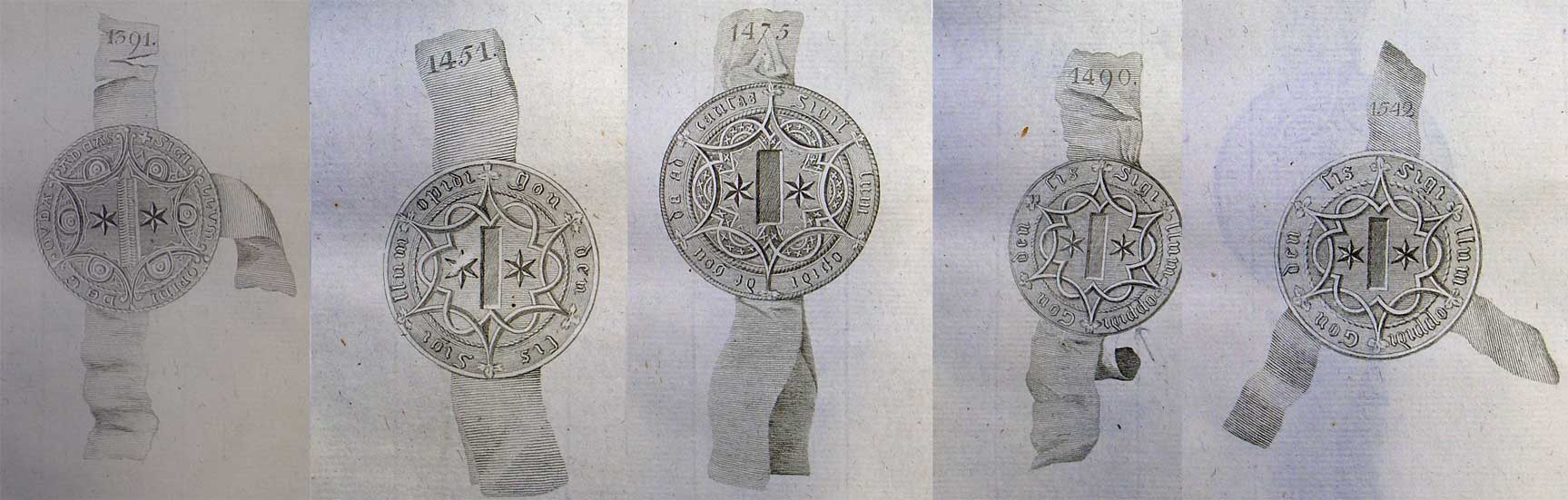 Stadszegels van Gouda gefotografeerd door uploader uit het originele boek